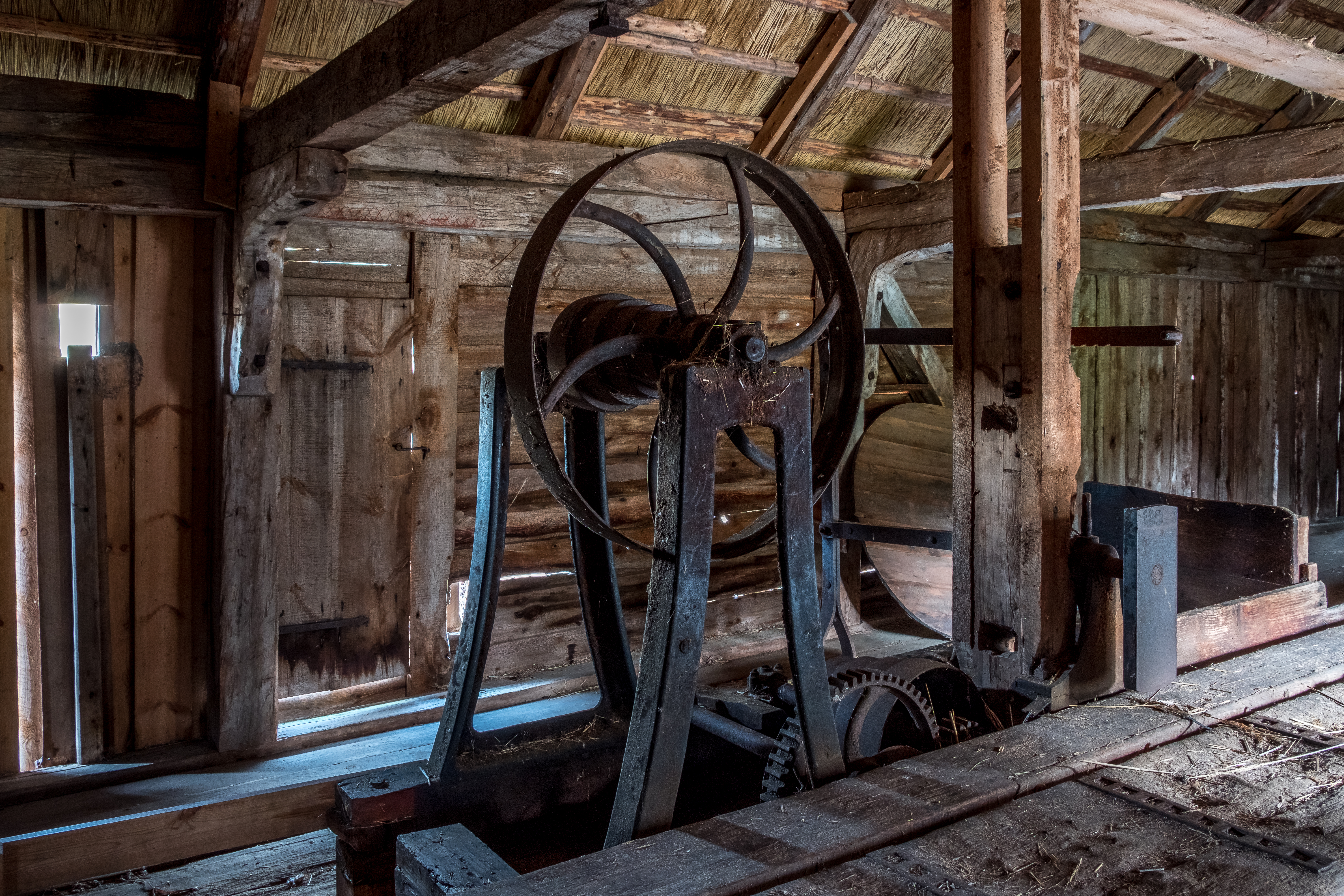 Bråfalls såg var ett litet vattendrivet sågverk som låg vid Bråfall, sydost om lilla Frillingen i Södermanlands län. Sågen drevs av gården i första hand för eget behov. Den lades ned i början på 1940-talet men byggnaden står fortfarande kvar. 2012 reparerades grunden och 2016 lades taket om med speciellt gräs som odlas fram för byggnader av detta slag. Mer information om sågen finns att läsa på Sörmalands museum.